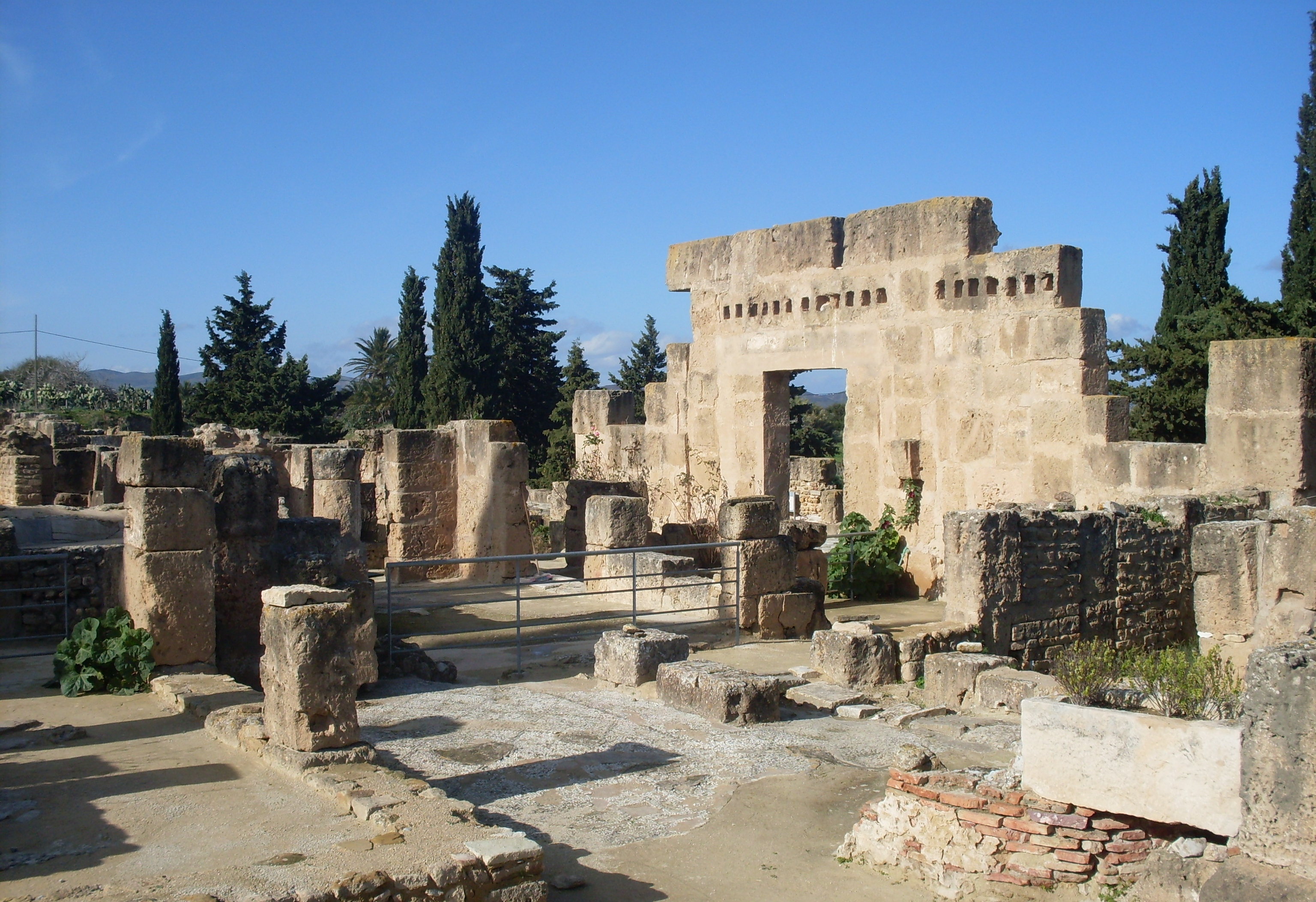 Vestiges d'habitations romaine, Utique